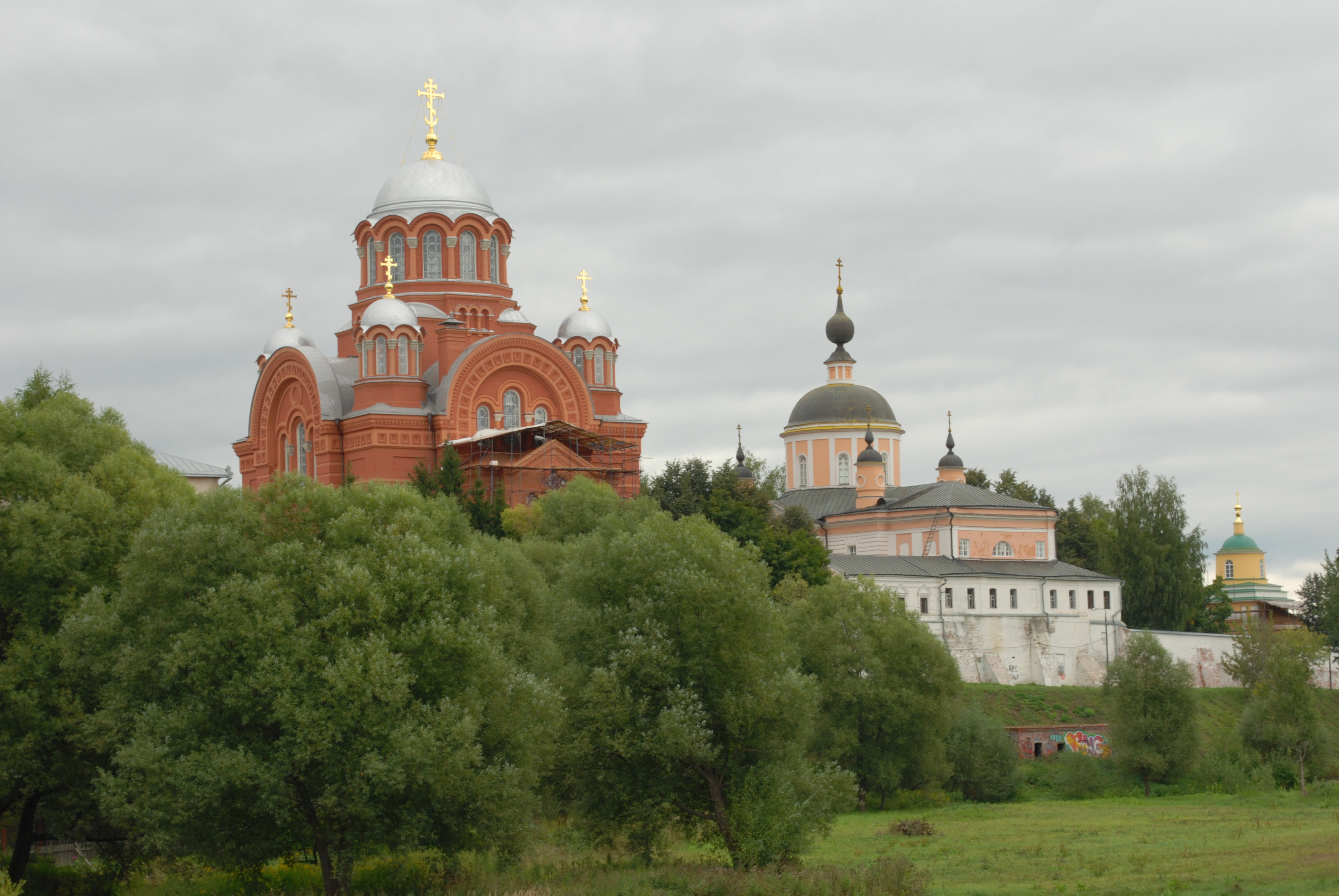 Комплекс сооружений Хотьковского монастыря (монастырь Покровский Хотьков) (Москва и Московская область, Хотьково, город Хотьково, Кооперативная улица)